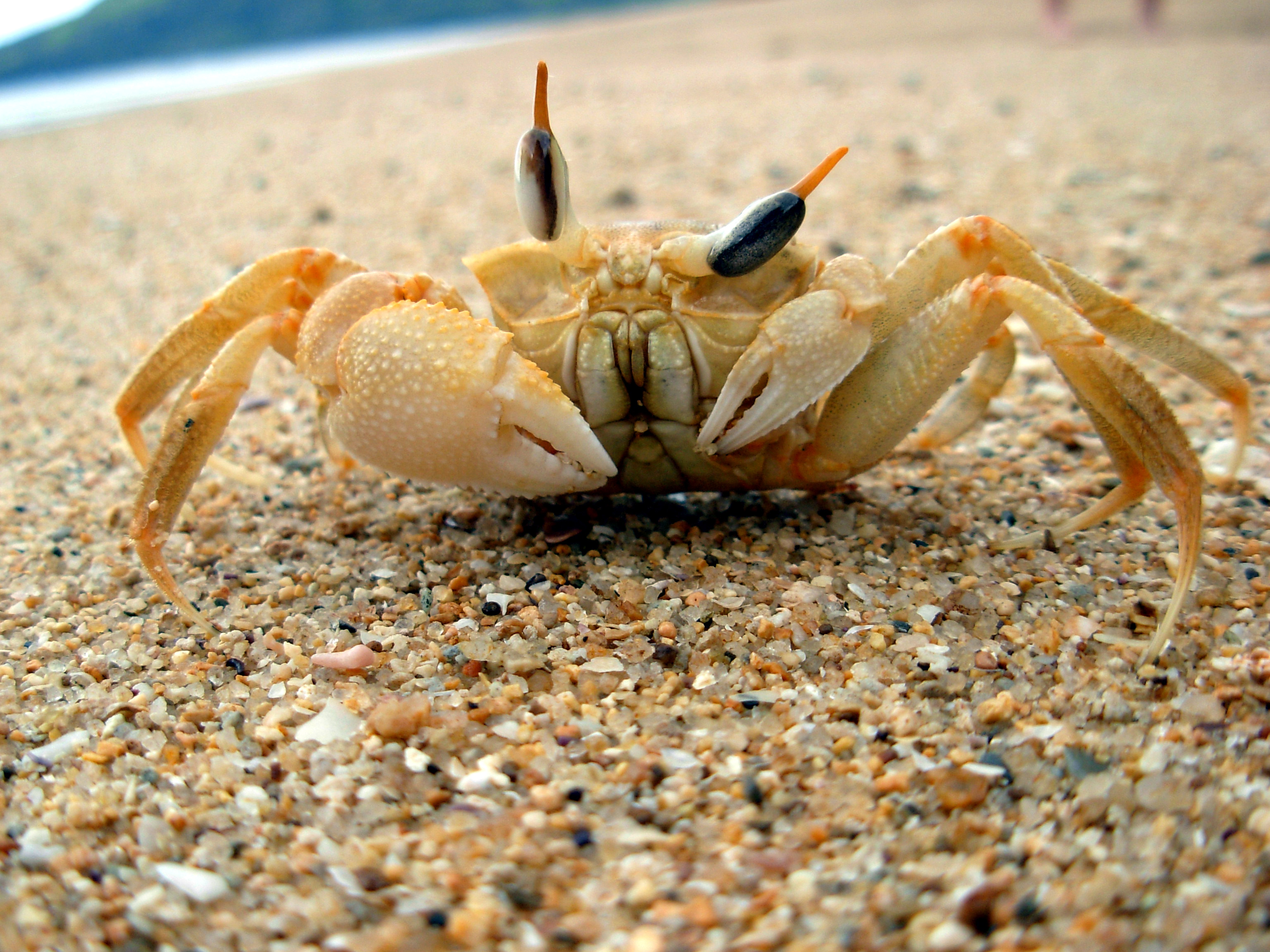 Un crabe de Madagascar, photographier près de Nosy Bé